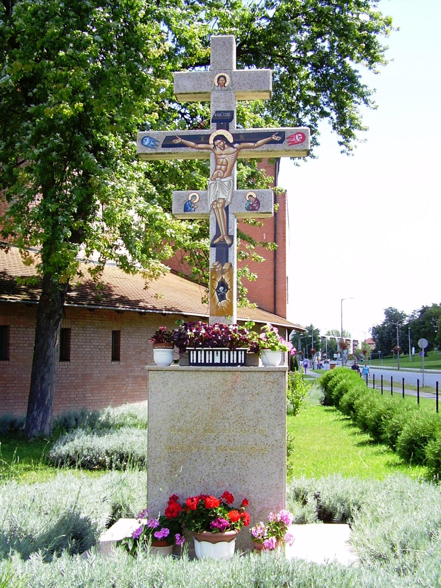 Kazincbarcikán a görög katolikus templom kertjében álló gránit kereszt az egyik hívő adománya.